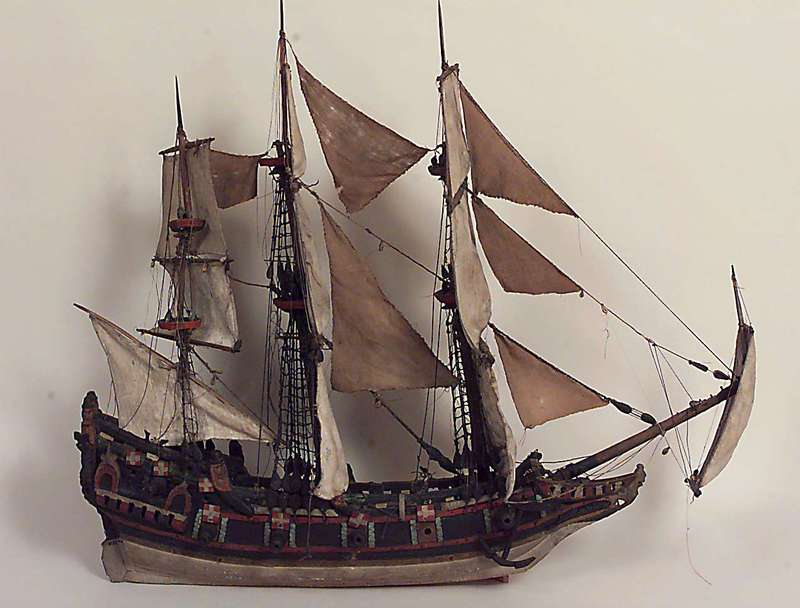 Kirkeskip. Brukssted: Akershus, Oppegård kirke